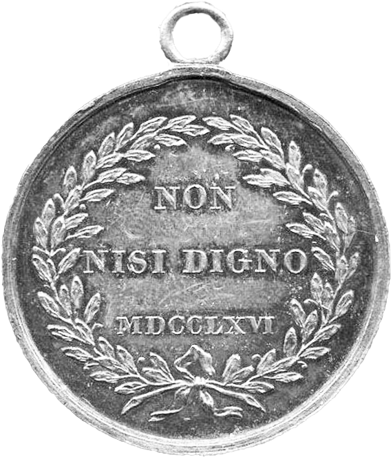 Medaille (Bijou) von 1766 der Freimaurerloge Minerva zu den drei Palmen in Leipzig, Rückseite, ohne Seidenband (Silber, ⌀ 33 mm)